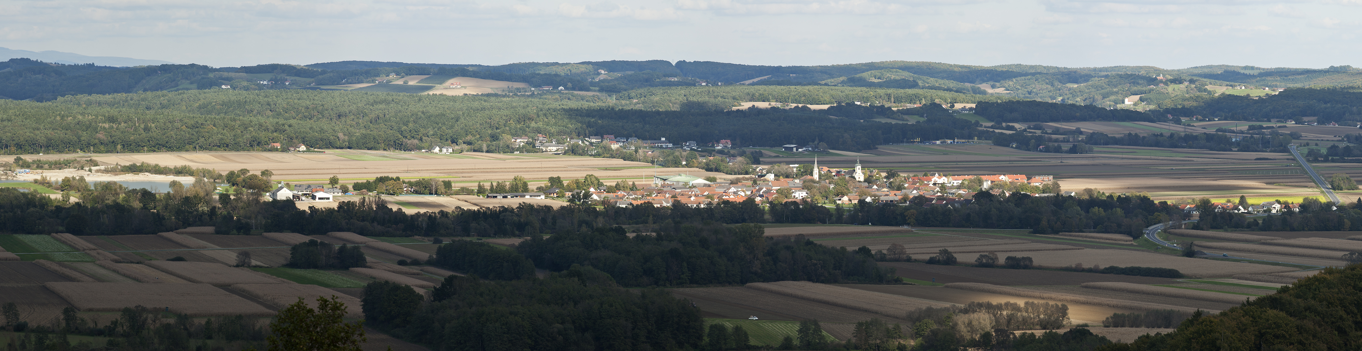 Königsdorf im Burgenland von Süden